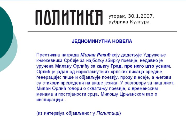 Из интервјуа објављеног у Политици